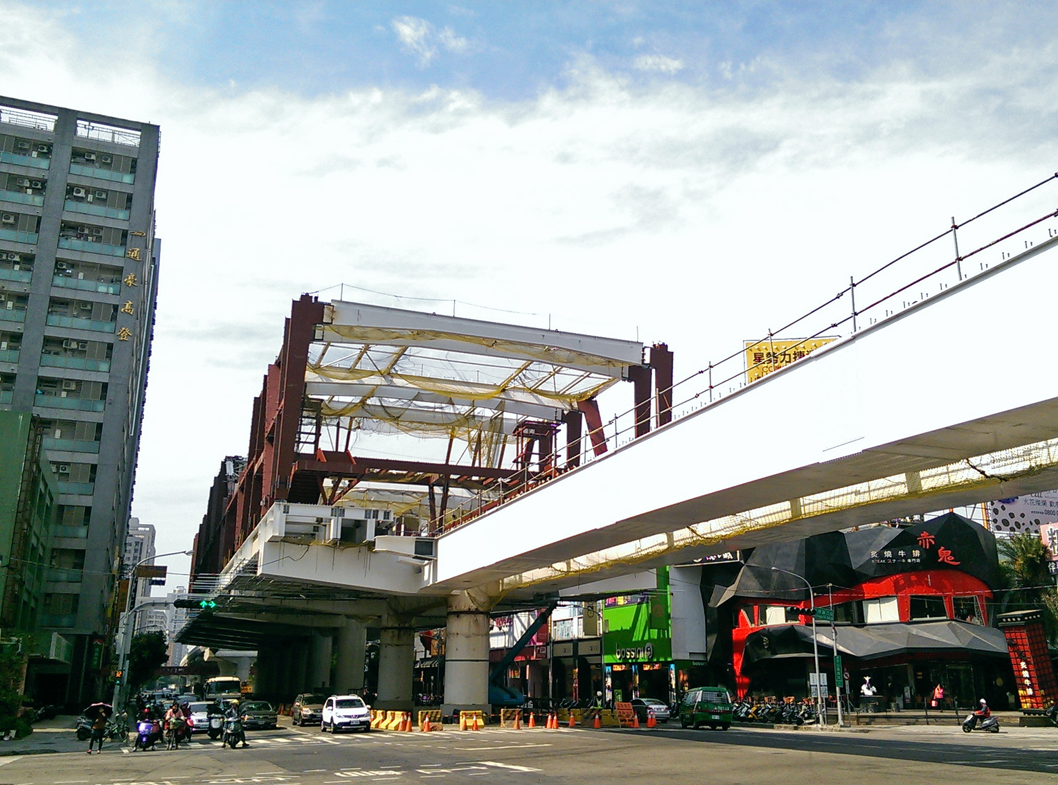 臺中捷運文心崇德站2015年2月工程